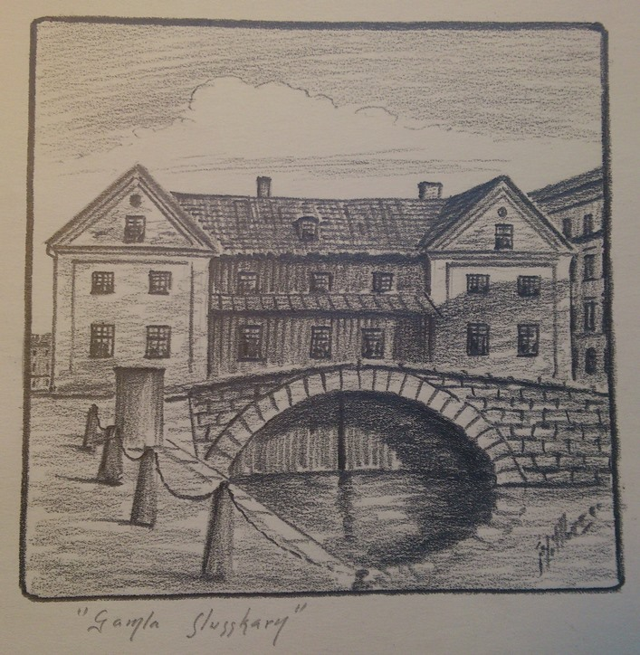 Kolteckning av Einar Hillberg föreställande Gamla slusskvarn i Göteborg